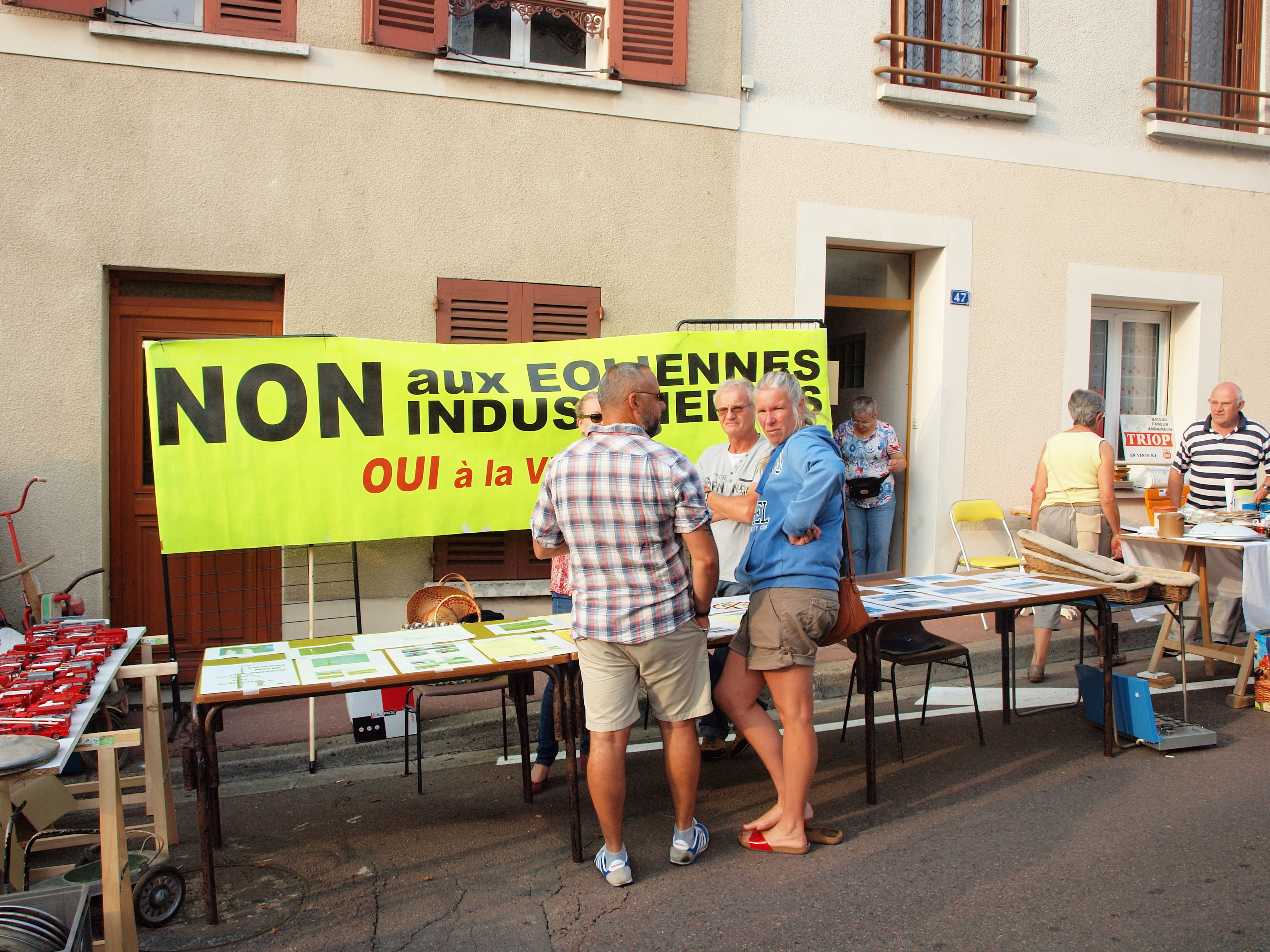 Foire aux oignons 2017 de Villeneuve-la-Guyard (Yonne, France)